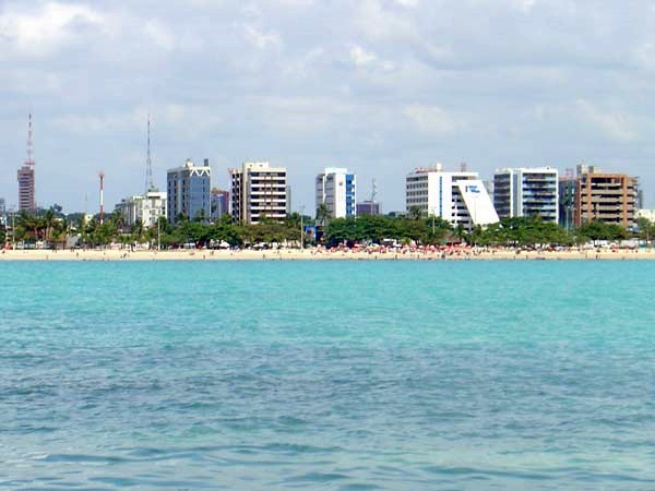 Maceio, BrasileOrla de Maceió